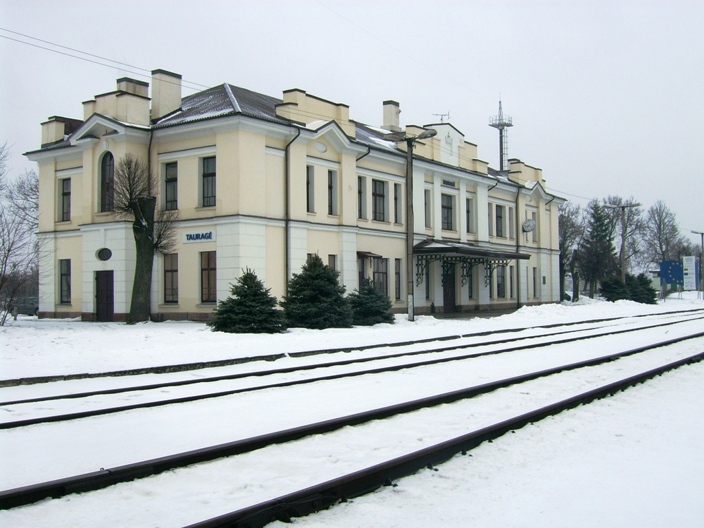 Tauragės geležinkelio stotis